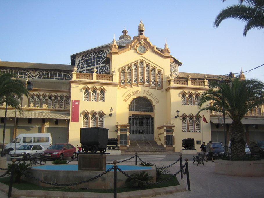 Mercado Público de La Unión (Murcia). Obra modernista de Víctor Beltrí. Sede del Festival del Cante de las Minas